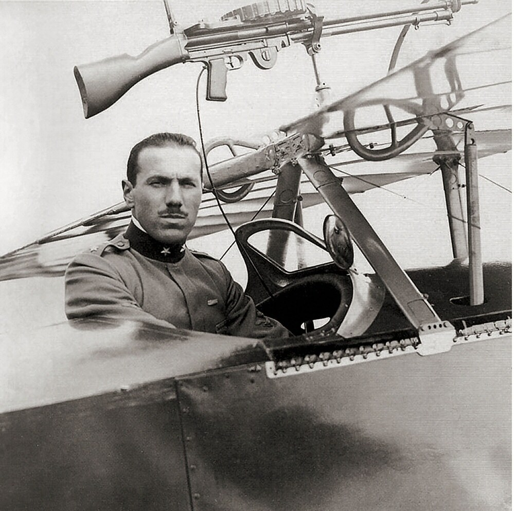 Francesco Baracca olasz ászpilóta a repülőgépében